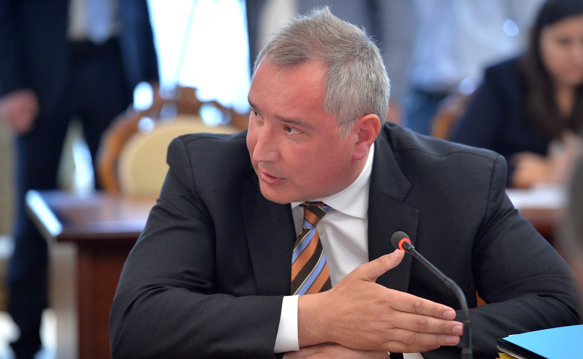 Заместитель Председателя Правительства Дмитрий Рогозин